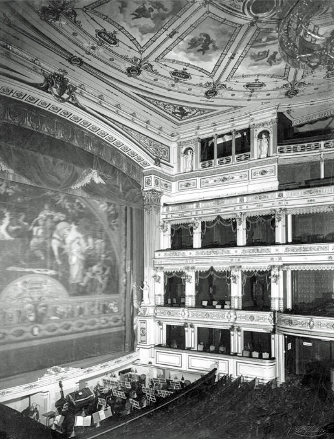 Im Saal des Neuen Theaters in Leipzig, um 1930